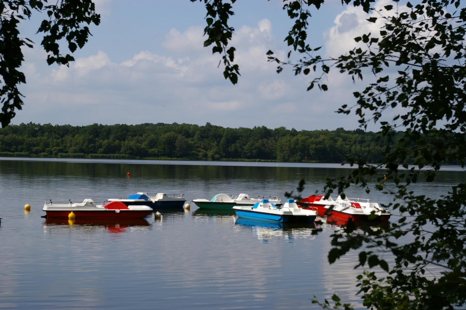 La zone de loisirs de l'étang du Gué de Selle (53)